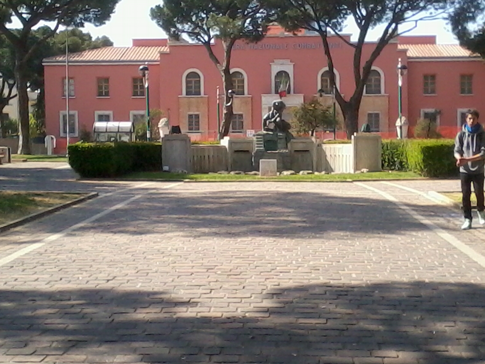 Piazza del Quadraro dove fu fondata ufficialmente la città di Latina